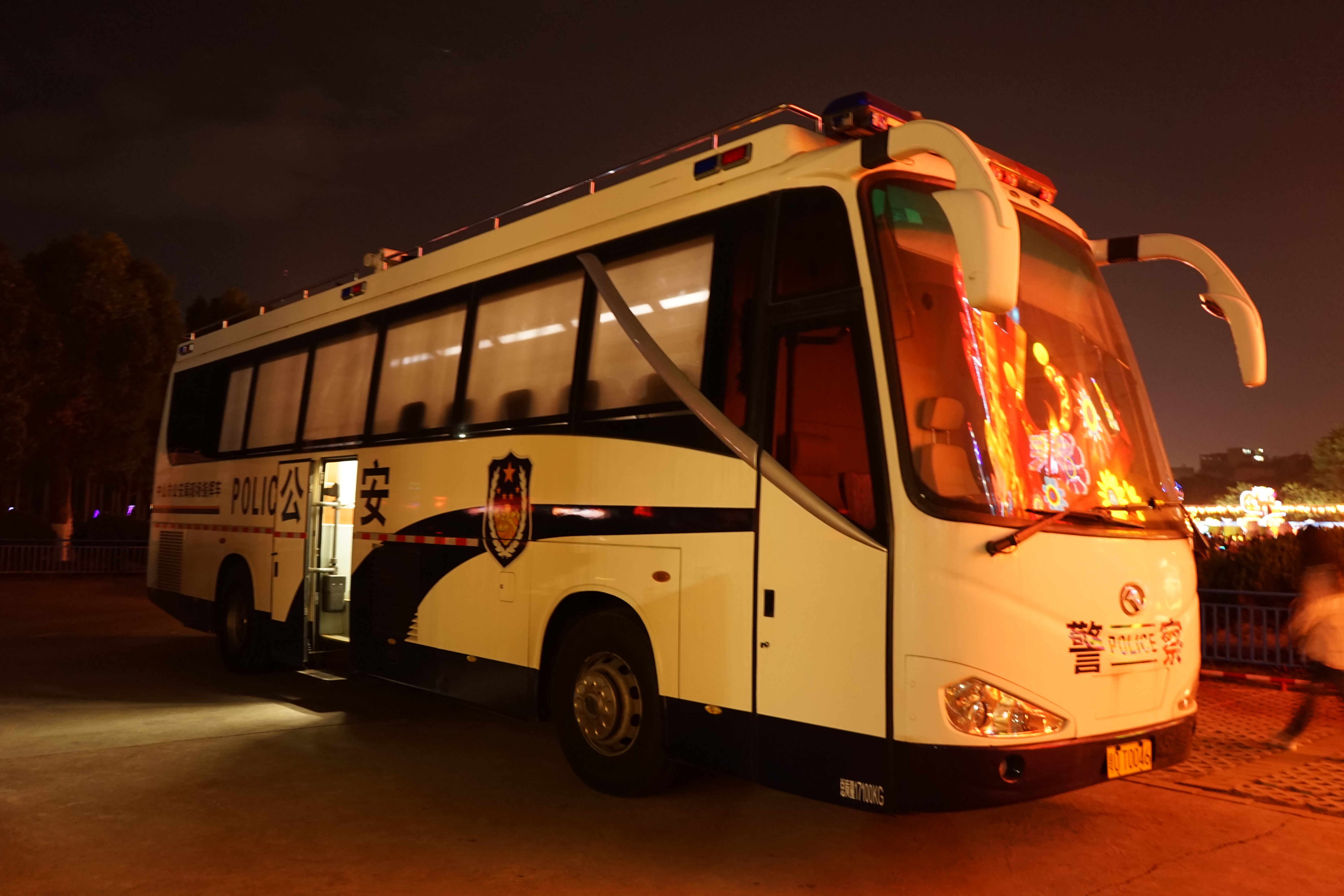 拍摄地点：中国广东省中山市孙文公园 单位：中山市公安局 车牌号：粵OT0046 -一个（省份简称）O的使用例子